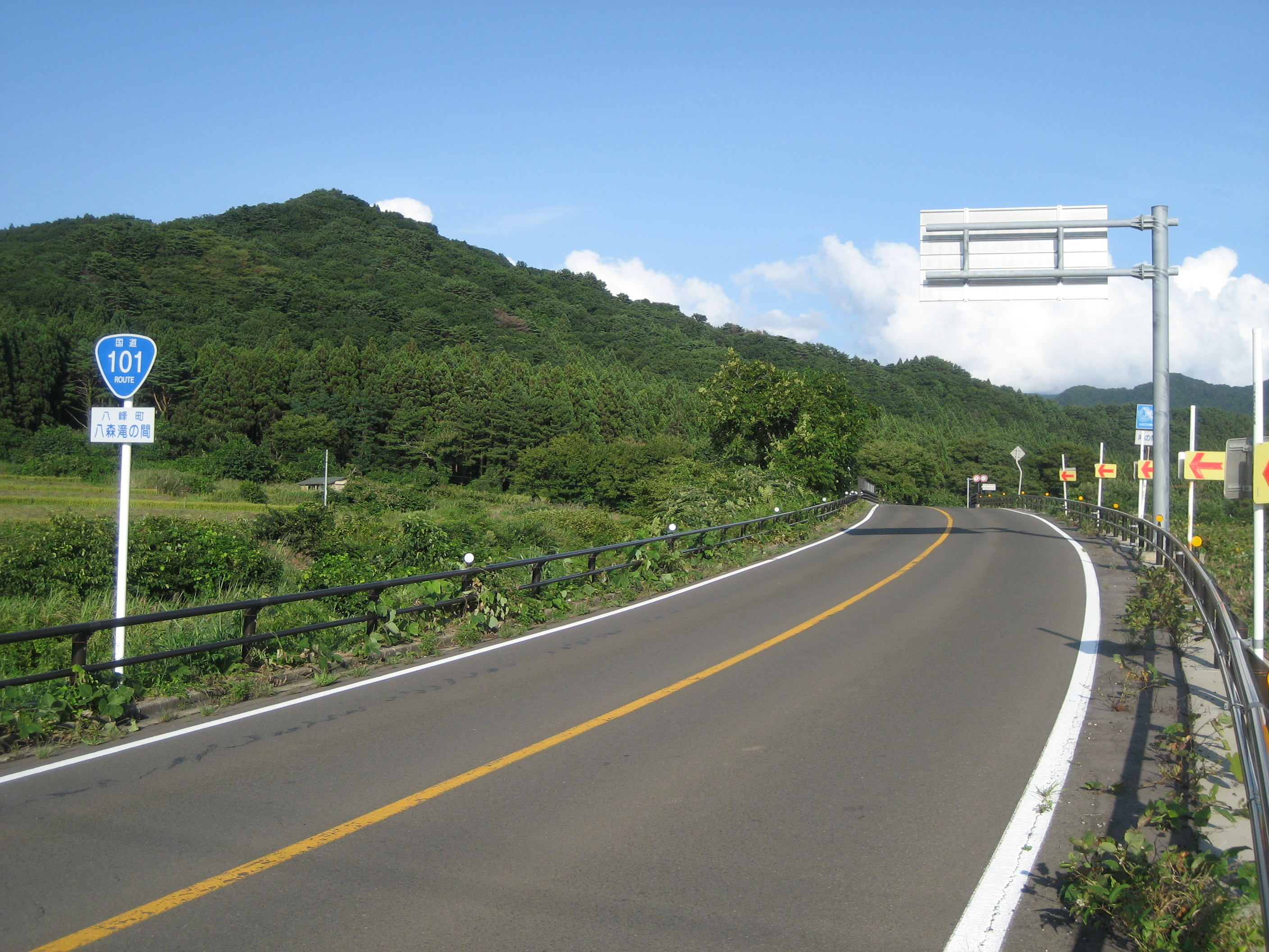 国道101号線秋田県山本郡八峰町八森滝の間付近（能代市方面を国道番号標識設置反対側車線より撮影）